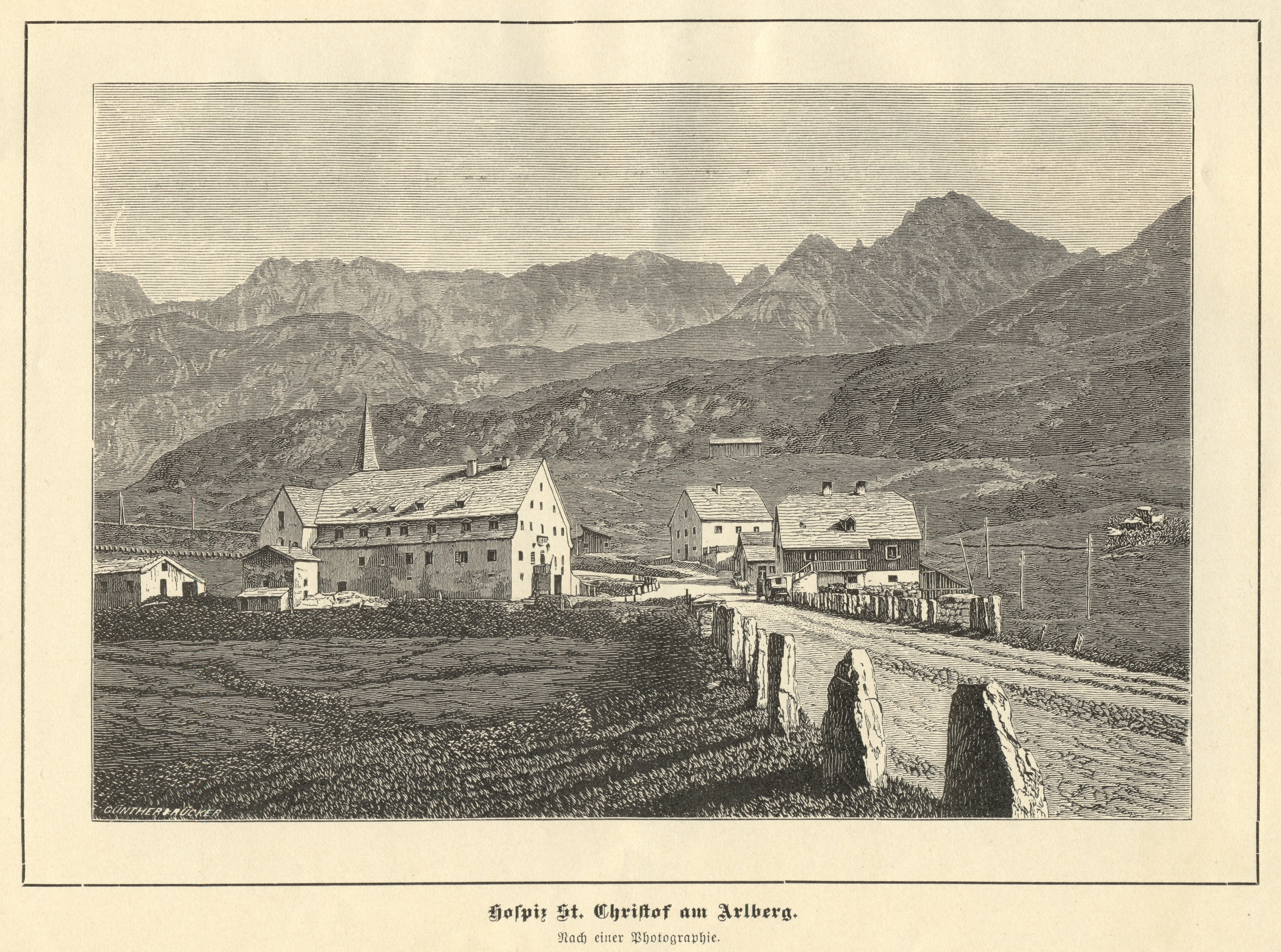 Hospiz St. Christof am Arlberg, Stein der Weisen 1889